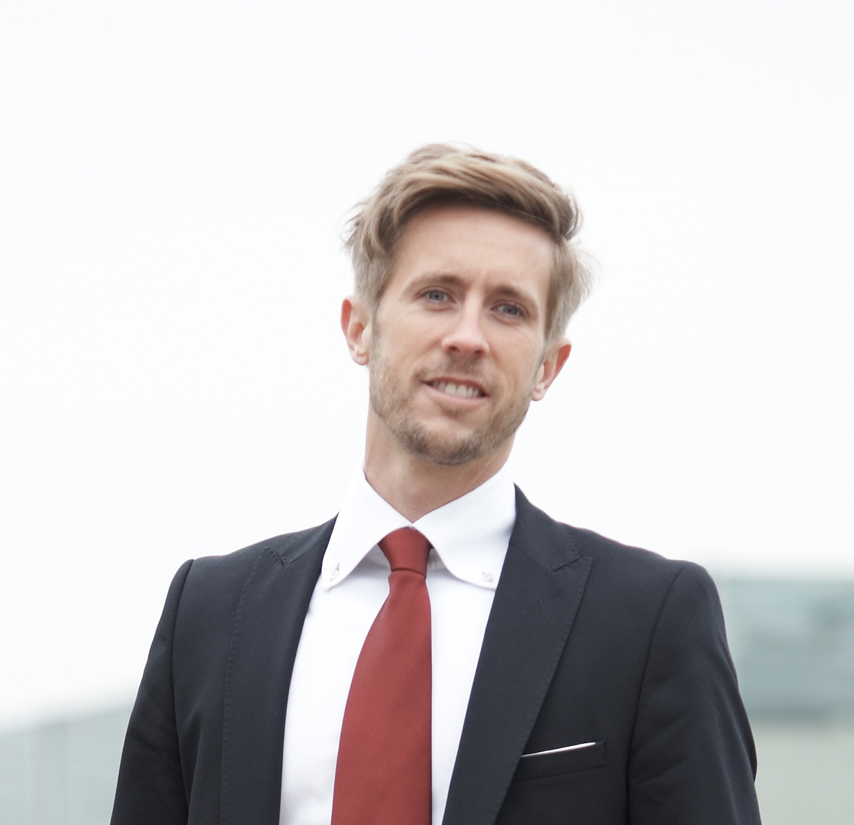 Dieses Bild zeigt Felix Thönnessen.